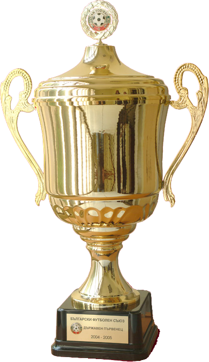 Снимката е модифицирата от оригиналната използва се с разрешение от авторите. Шампионска купа на България за сезон 2004/05